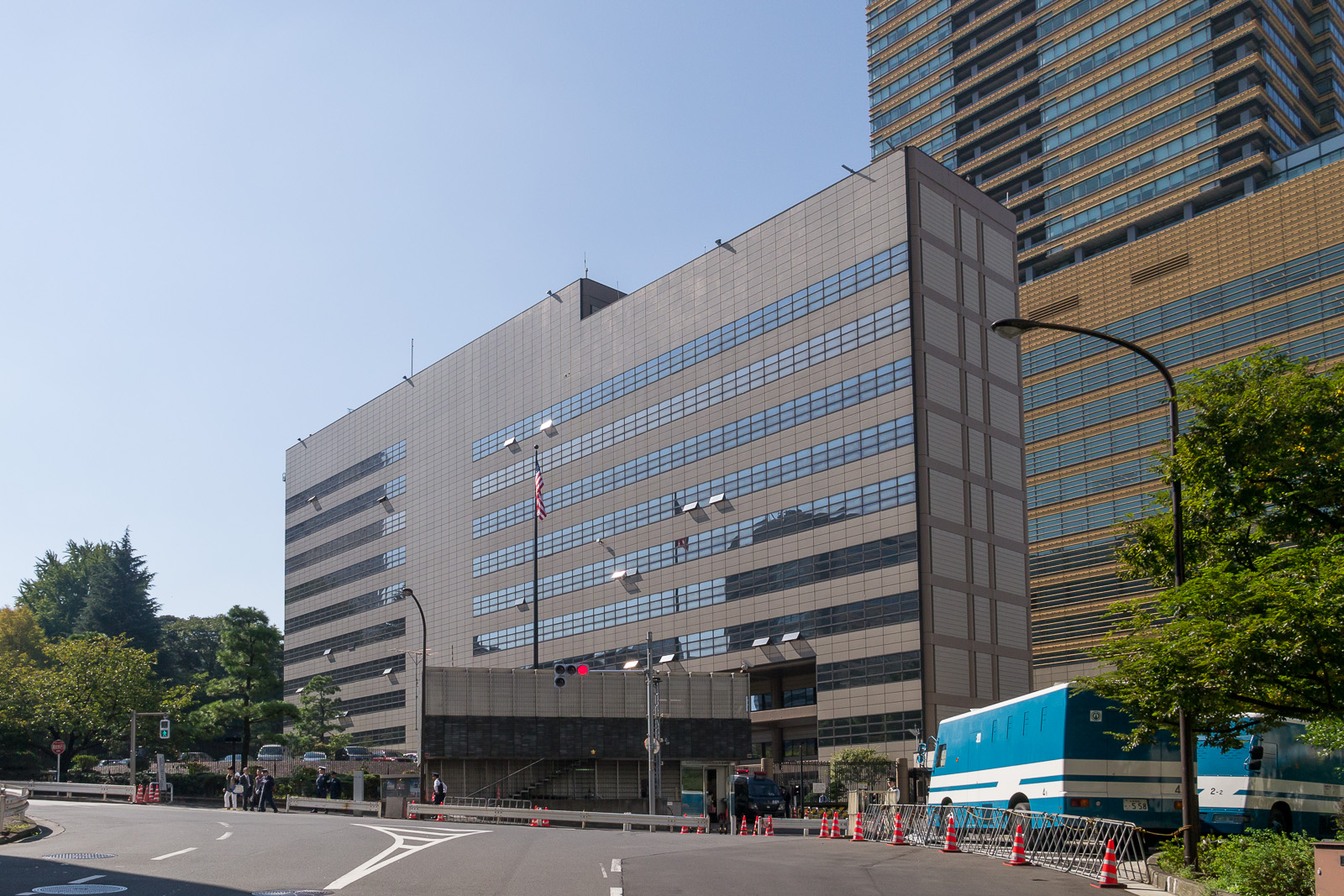 駐日アメリカ合衆国大使館、東京都港区赤坂1丁目。